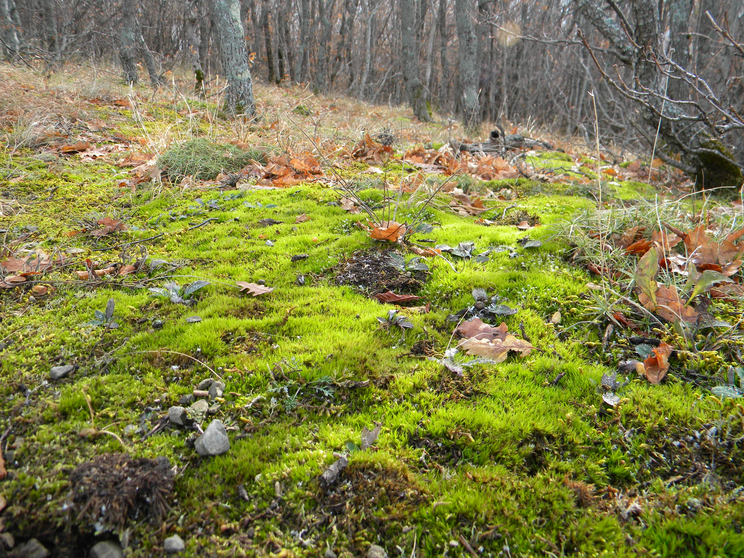 Растителна покривка